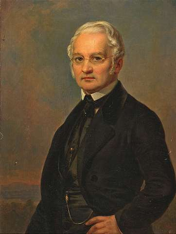 Anonym: Portrait Georg Ludwig August Emmerling (1797-1867). Öl/Leinwand, 47 x 36 cm, 1848/49 Mitglied des Vorparlaments und der Frankfurter Nationalversammlung, 1851-1867 Generalstaatsprokurator des Oberappelations- und Kassationsgerichtes in Darmstadt.